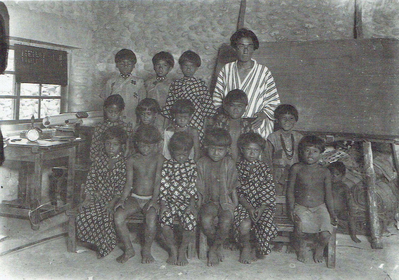 馬淵東一與雅美族眾兒童。